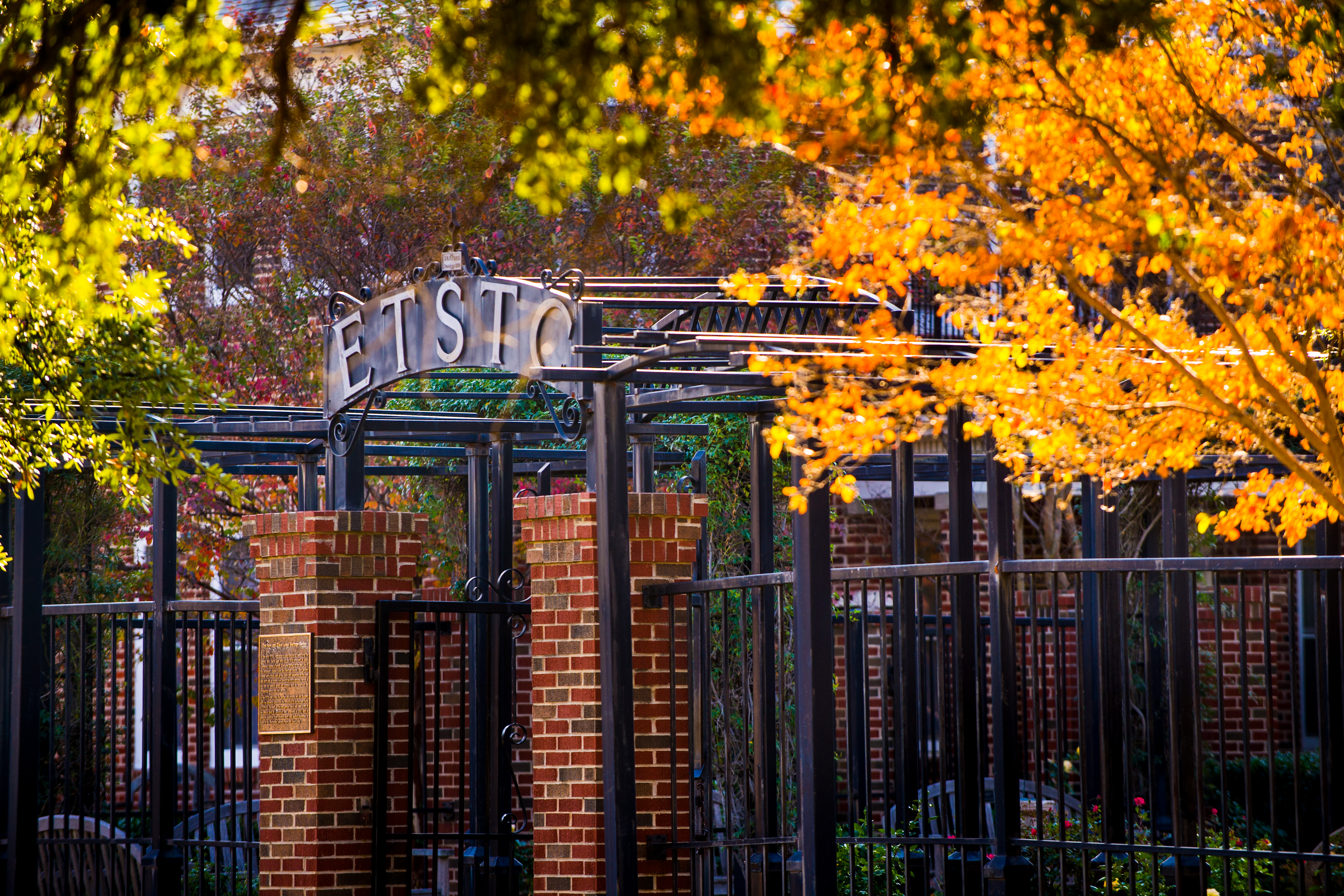 ETSTC Heritage Garden-8270 ETSTC Heritage Garden